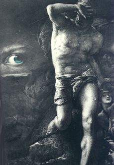 La Conscience (d'après Victor Hugo)